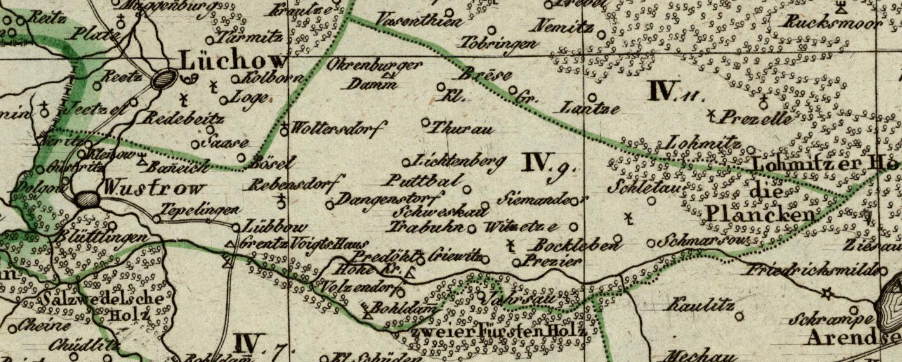 Der Kanton Wustrow (1810-13) im Distrikt Salzwedel, Departement der Elbe, Königreich Westphalen